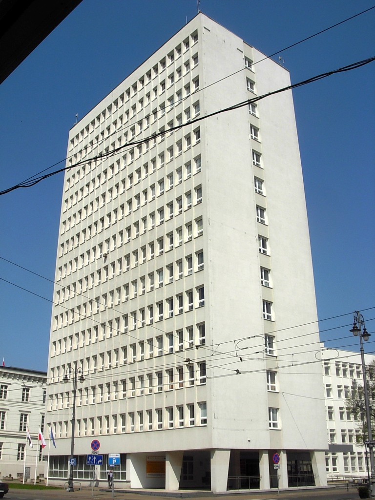 Budynek biurowy, ul. Konarskiego 1 Bydgoszcz, użytkowany m.in. przez Kujawsko-Pomorski Urząd Wojewódzki